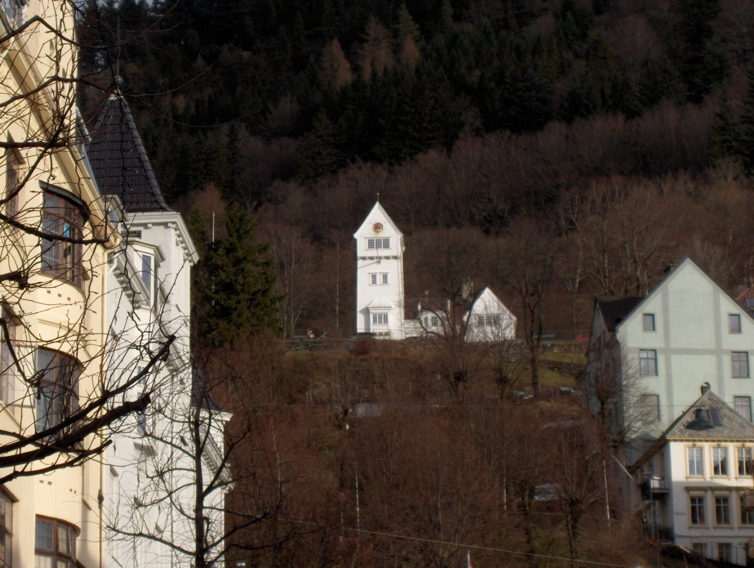 Ancienne caserne et tour e garde de Skansen. Située en hauteaur pour voir toute la ville et augmenter la pression des tuyaux. Own work, february 2006. Saty 4 novembre 2006 à 16:55 (CET)